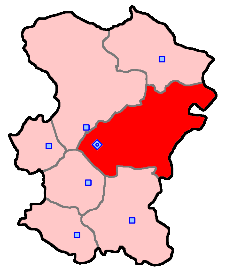 حوزهٔ انتخاباتی همدان و فامنین برای انتخابات مجلس شورای اسلامی